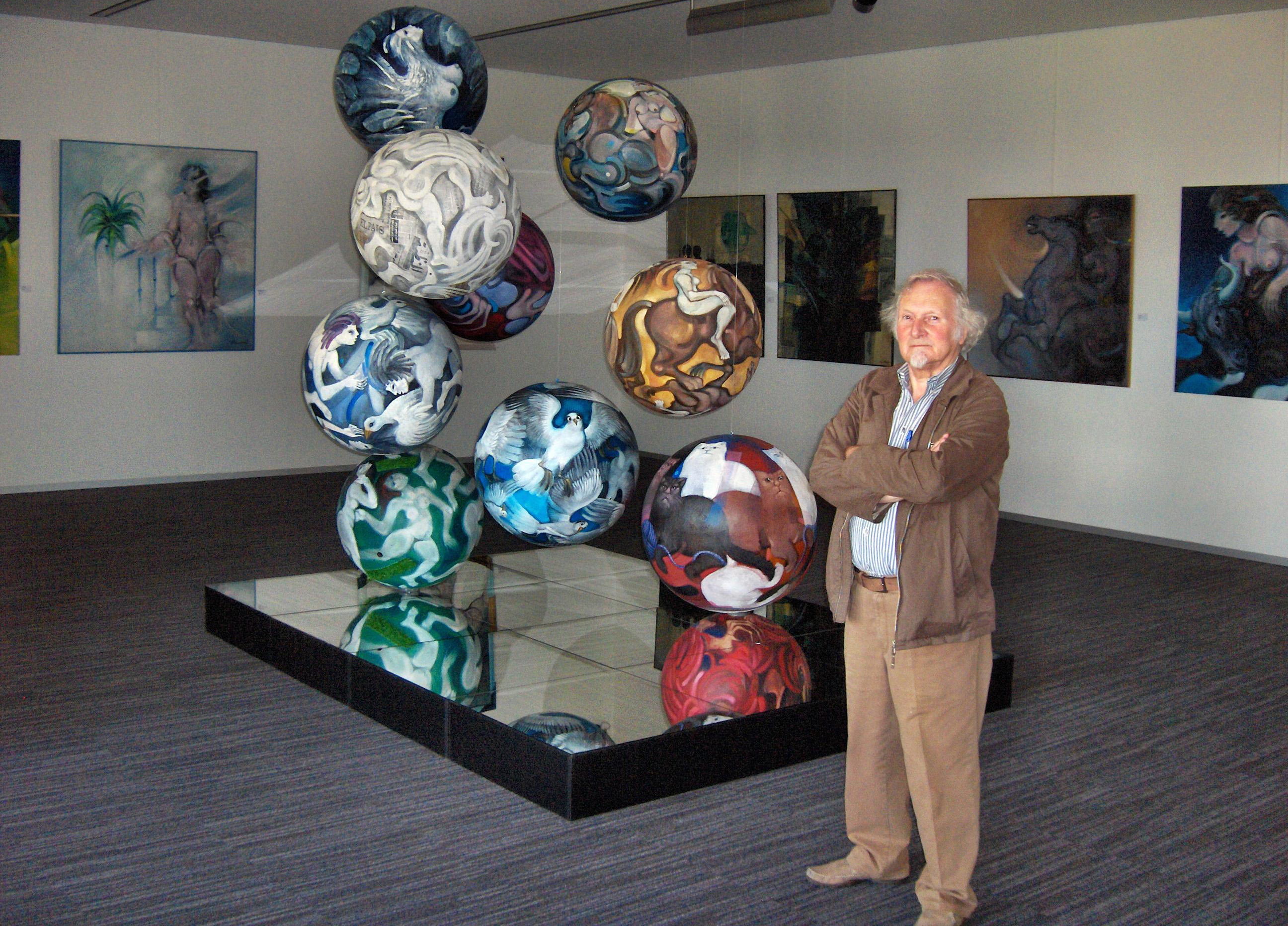 Portret van de kunstenaar te midden van zijn werk Retrospectieve tentoonstelling "Staf Versluyscentrum", Bredene, 2008